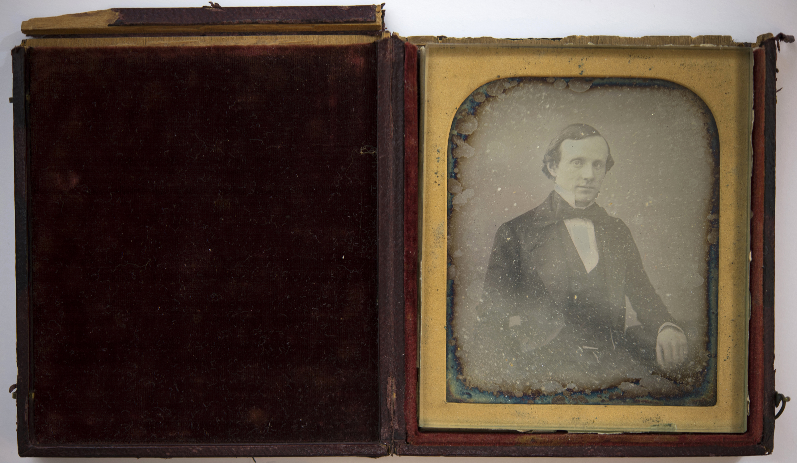 Dagerrotüüp Tallinna Linnamuuseumi kollektsioonis. Daguerreobase:TLM-4929_KA-672 MUIS:TLM 4929 F